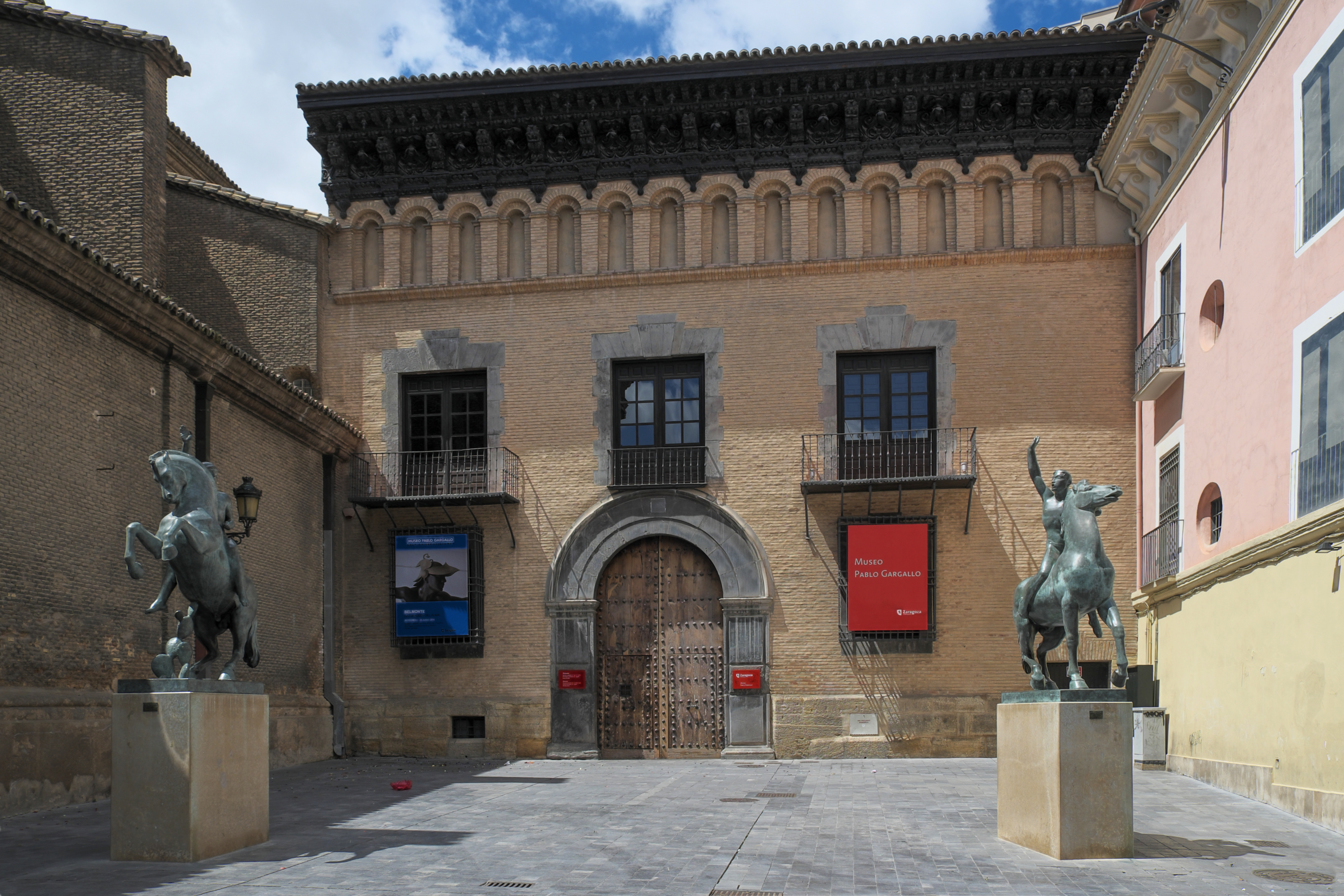 Museo Pablo Gargallo (Palacio de Argillo) in Saragossa (Aragón/Spanien)